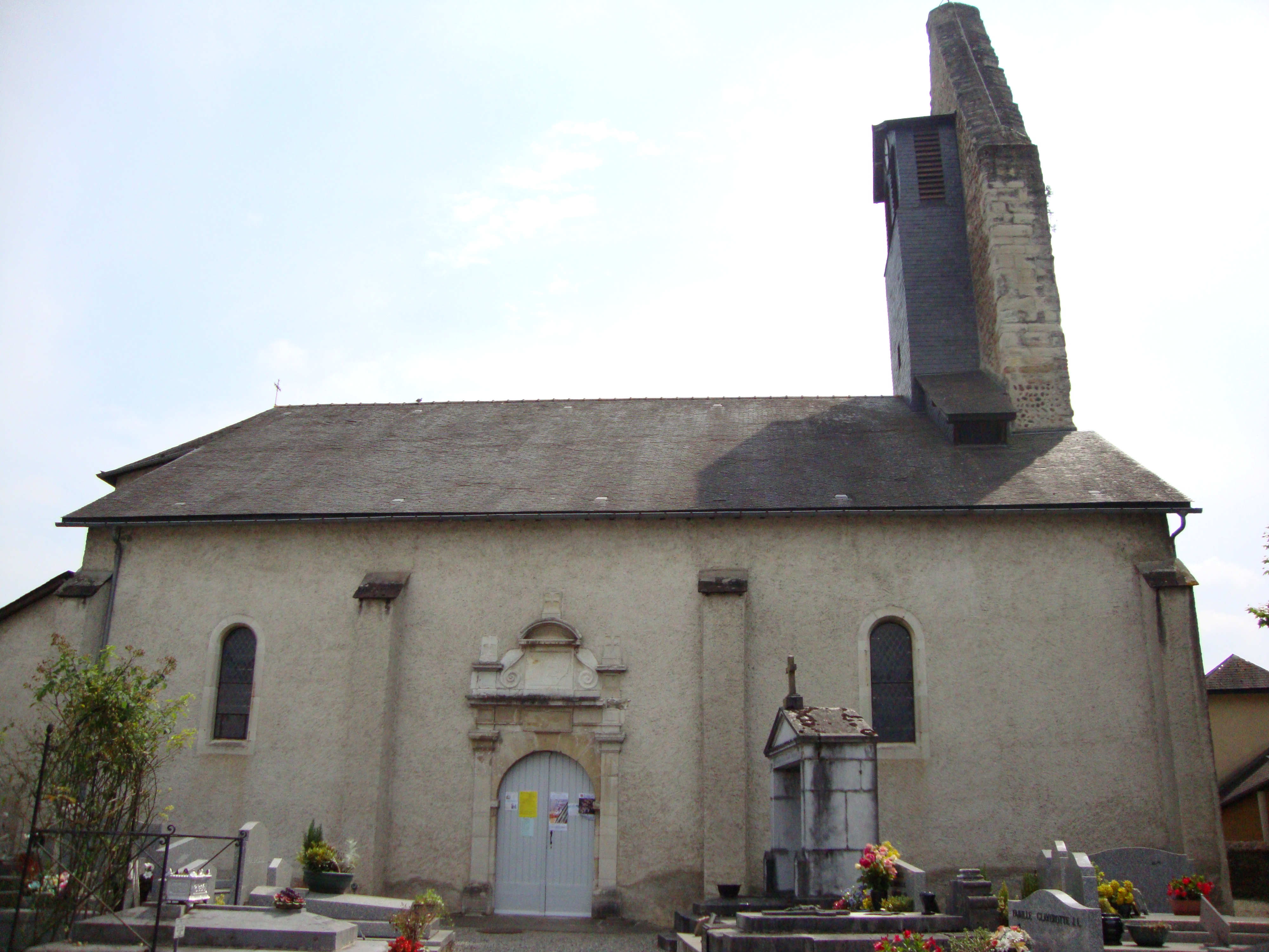 Lescar (Pyr-Atl, Fr) Église Saint-Julien, vue latérale